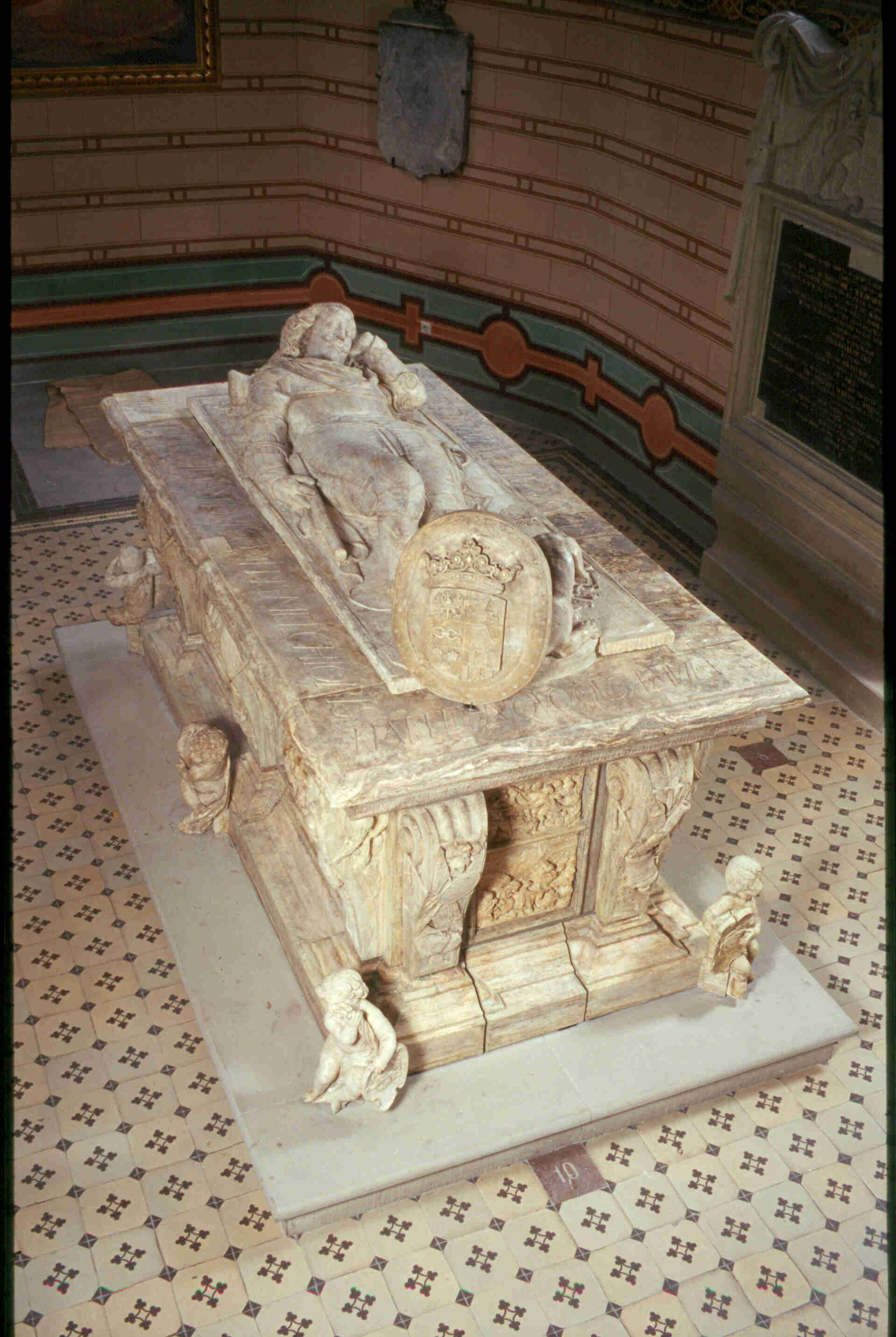 Laudenbach, Grabmal des Feldmarschalls Graf von Hatzfeld, geschaffen von A. Kern